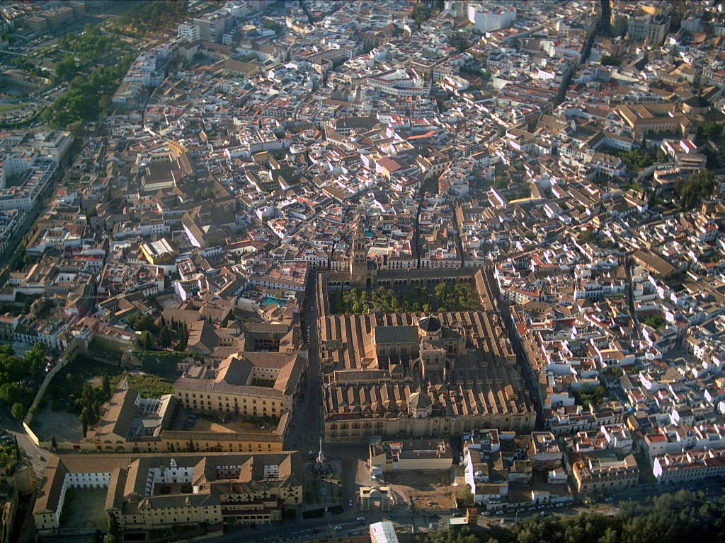 Mezquita Catedral de Córdoba desde el aire.